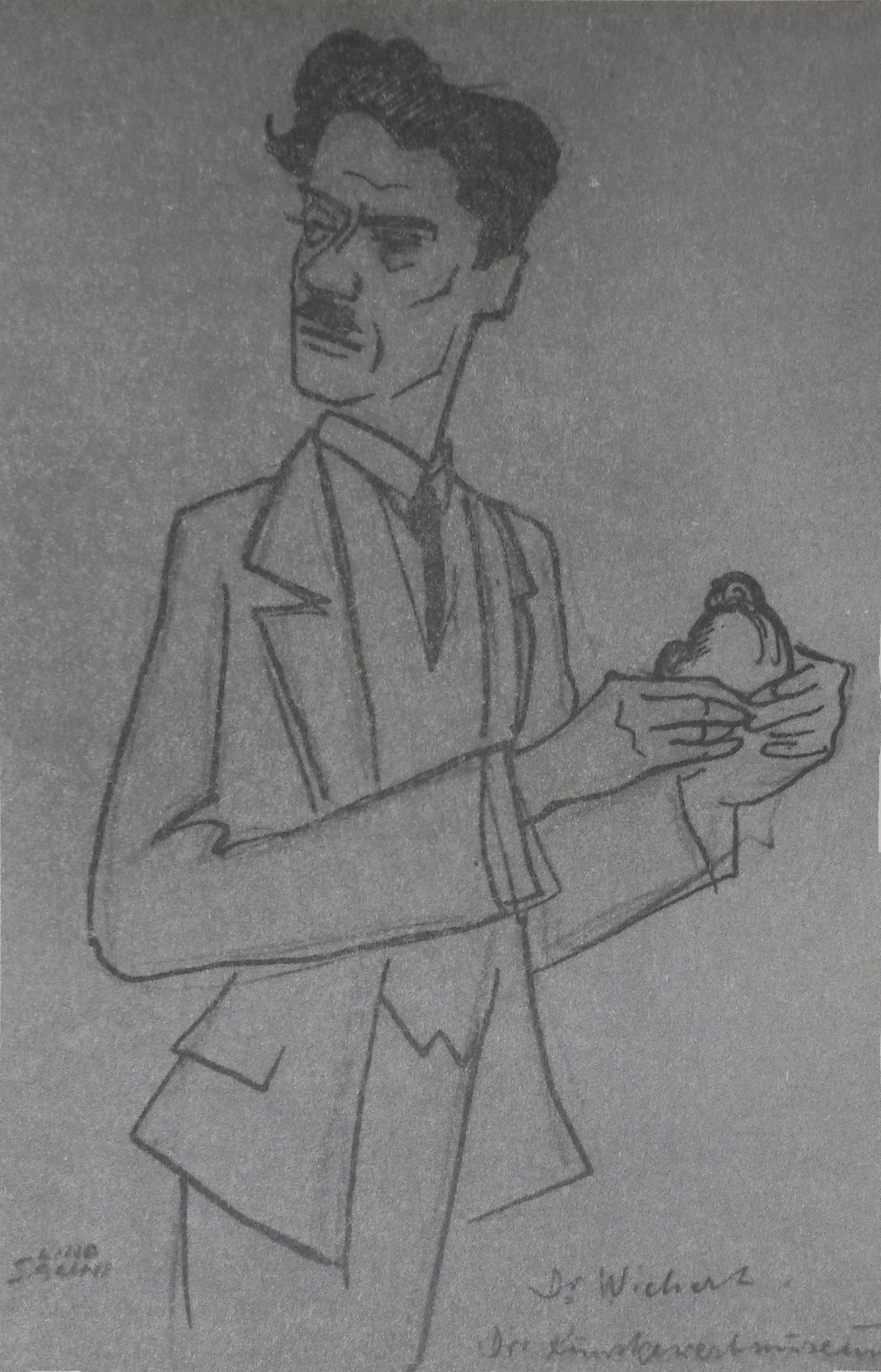 Darstellung von Fritz Wichert durch Lino Salini